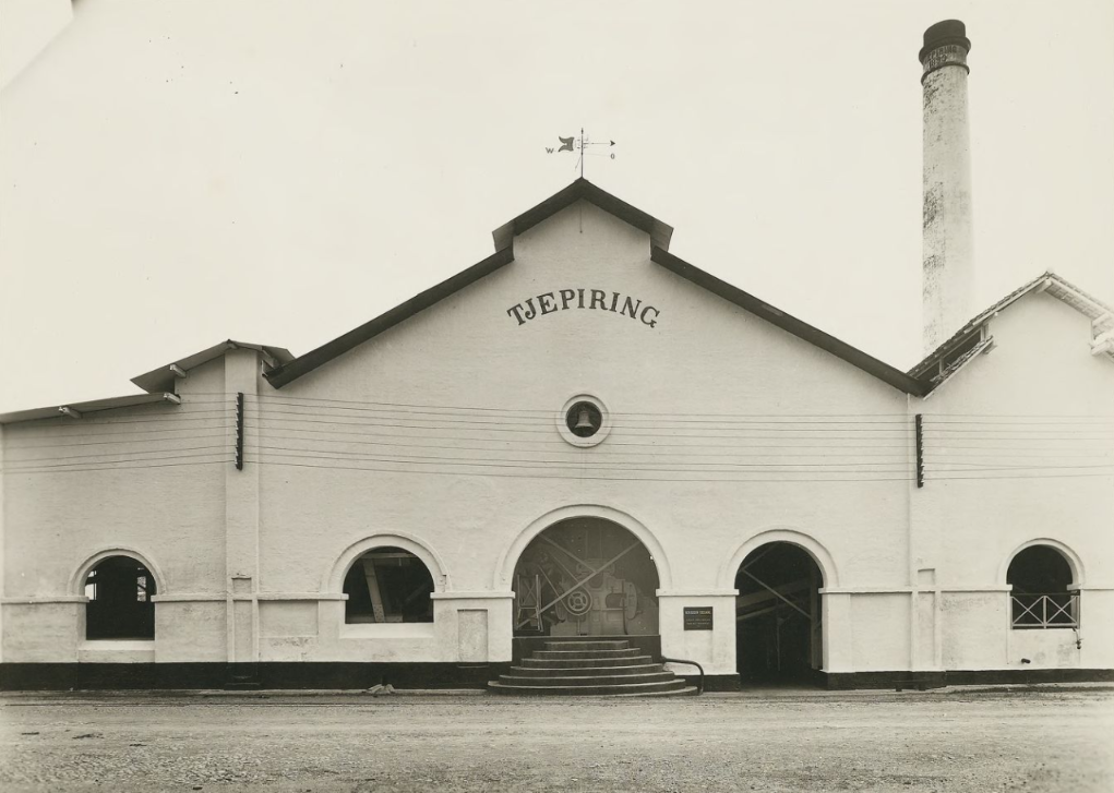 Pabrik Gula Cepiring